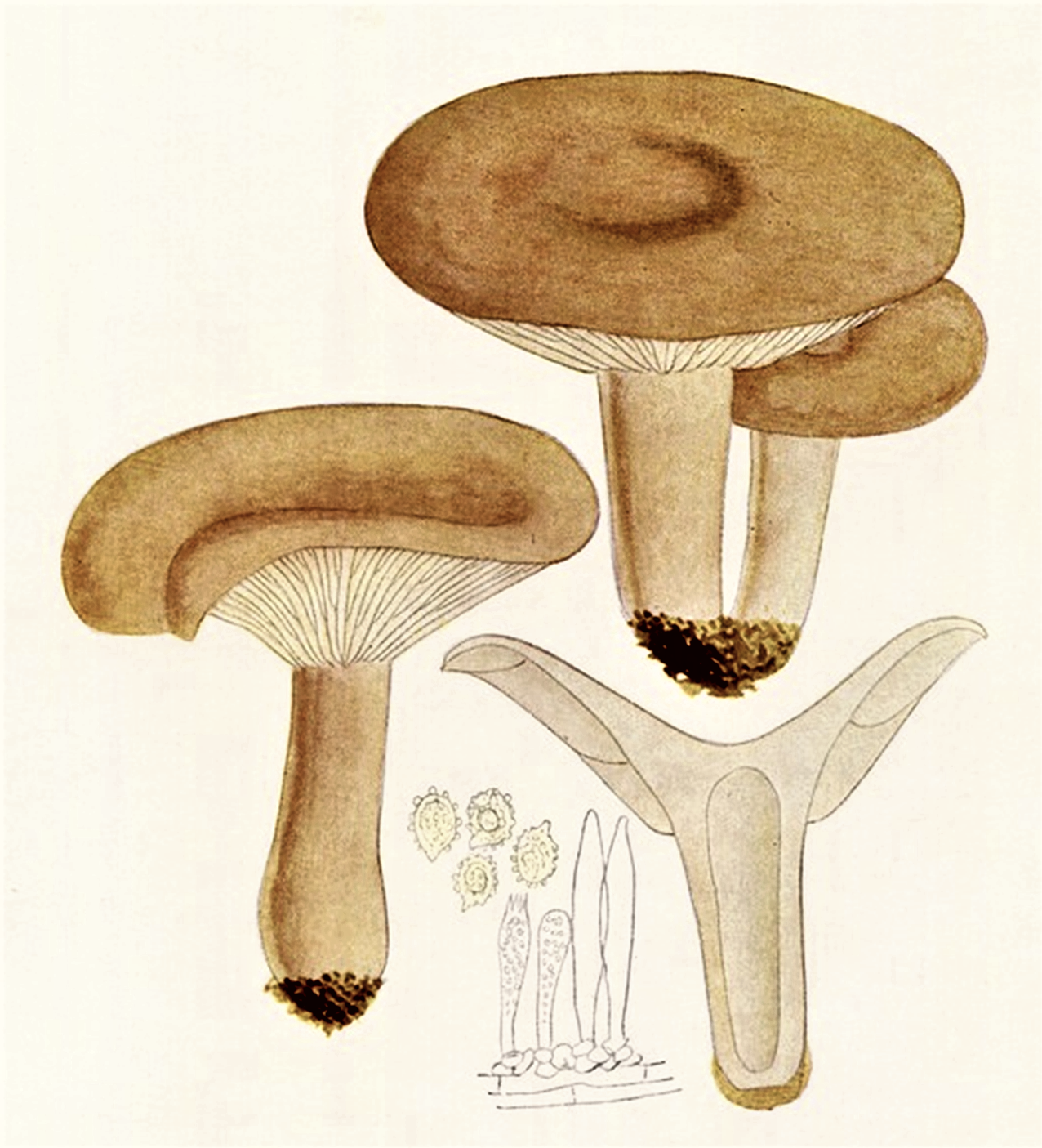 Bres.: Lactarius pallidus Pers. (1797)